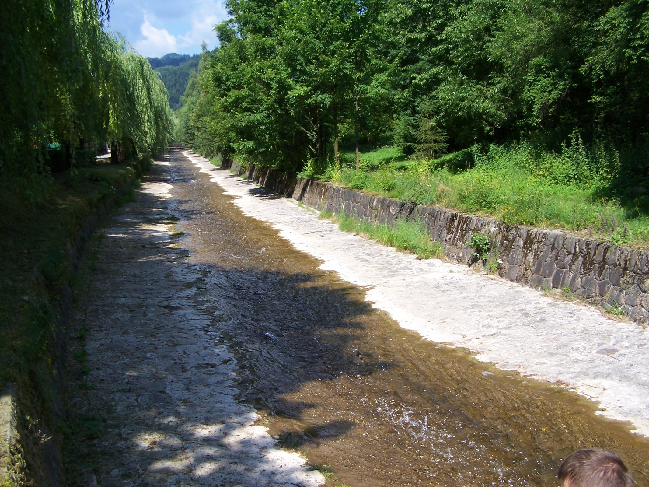 Potok Czercz w Piwnicznej